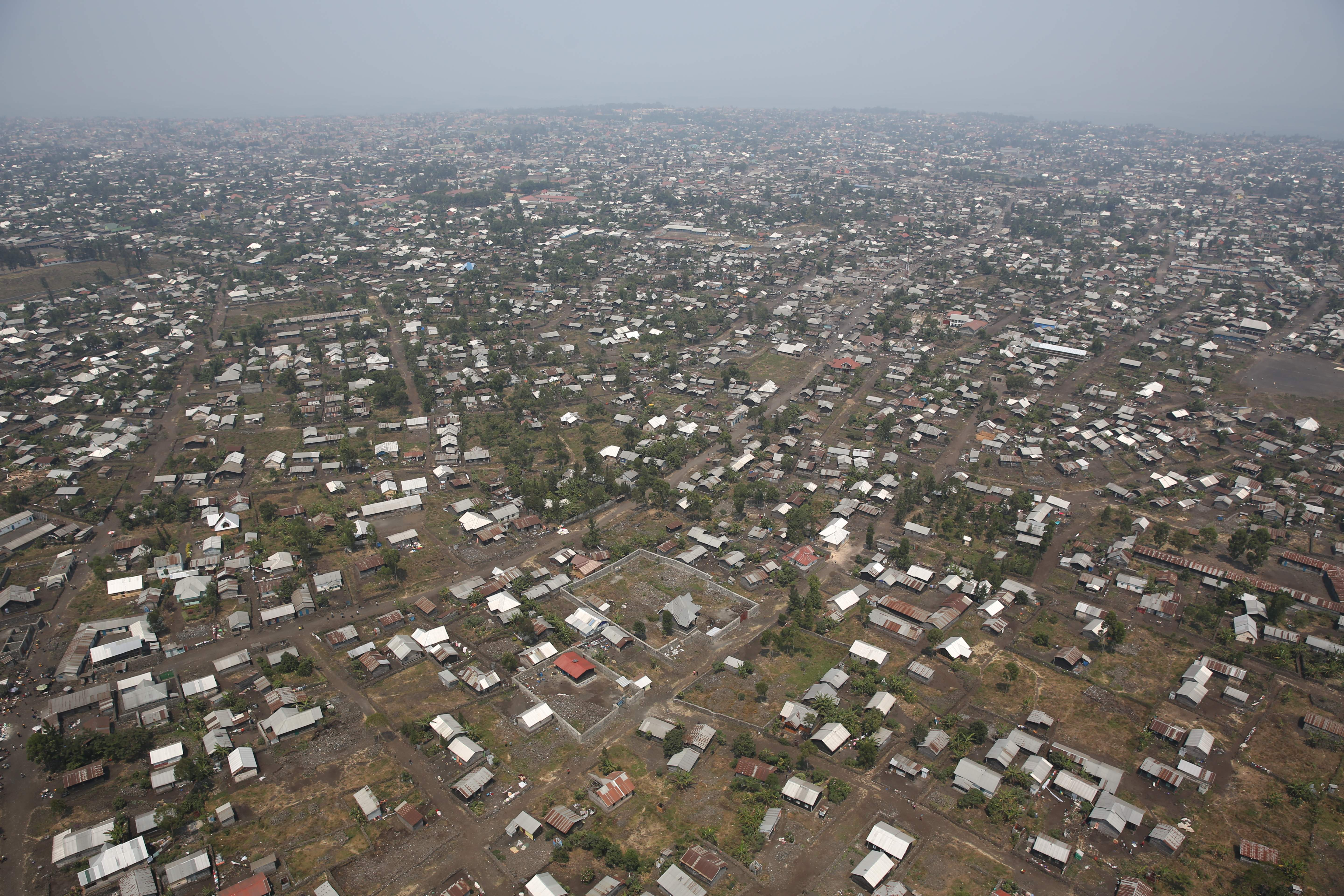 photo MONUSCO / Abel Kavanagh